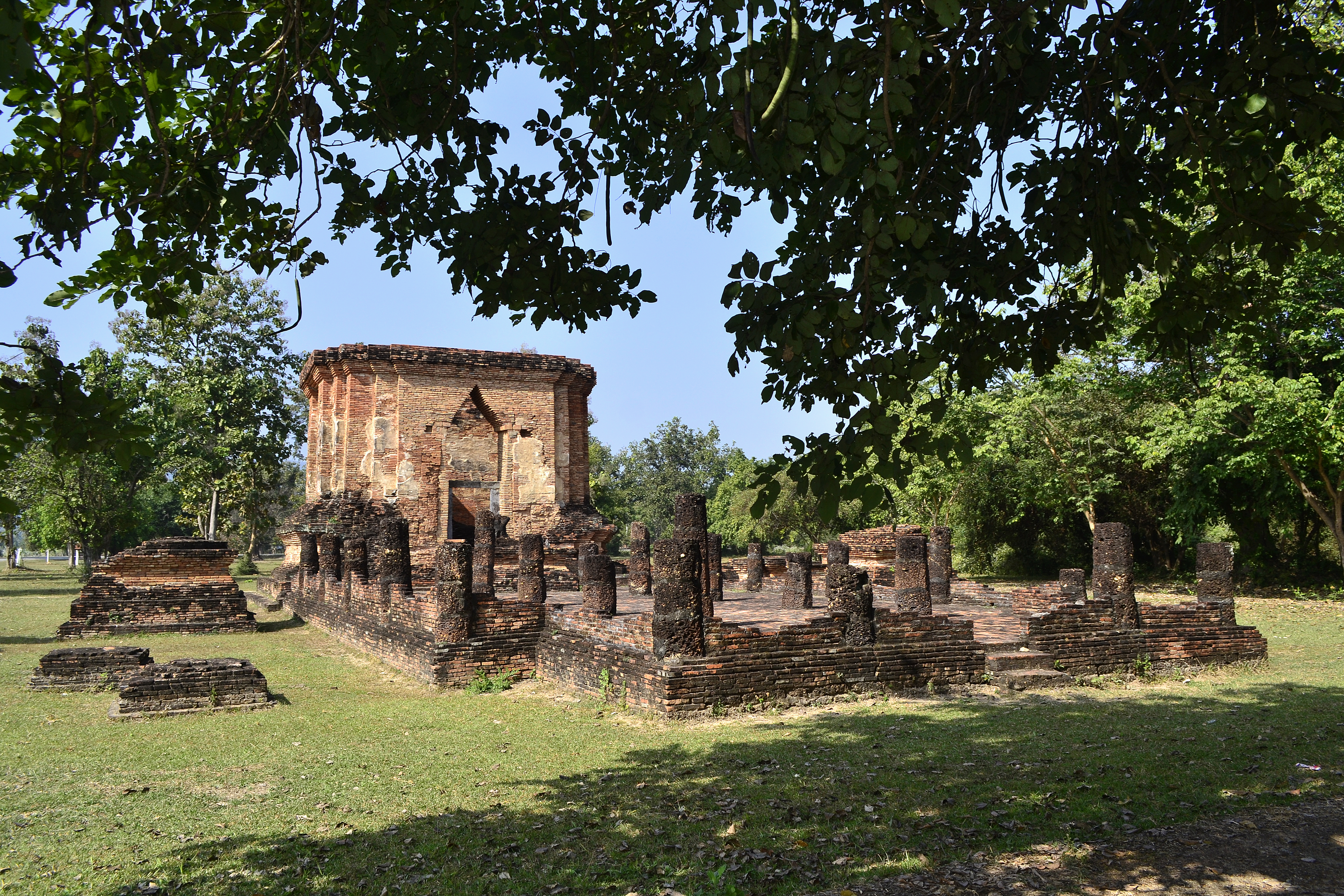 Wat Thuek im Geschichtspark Sukhothai